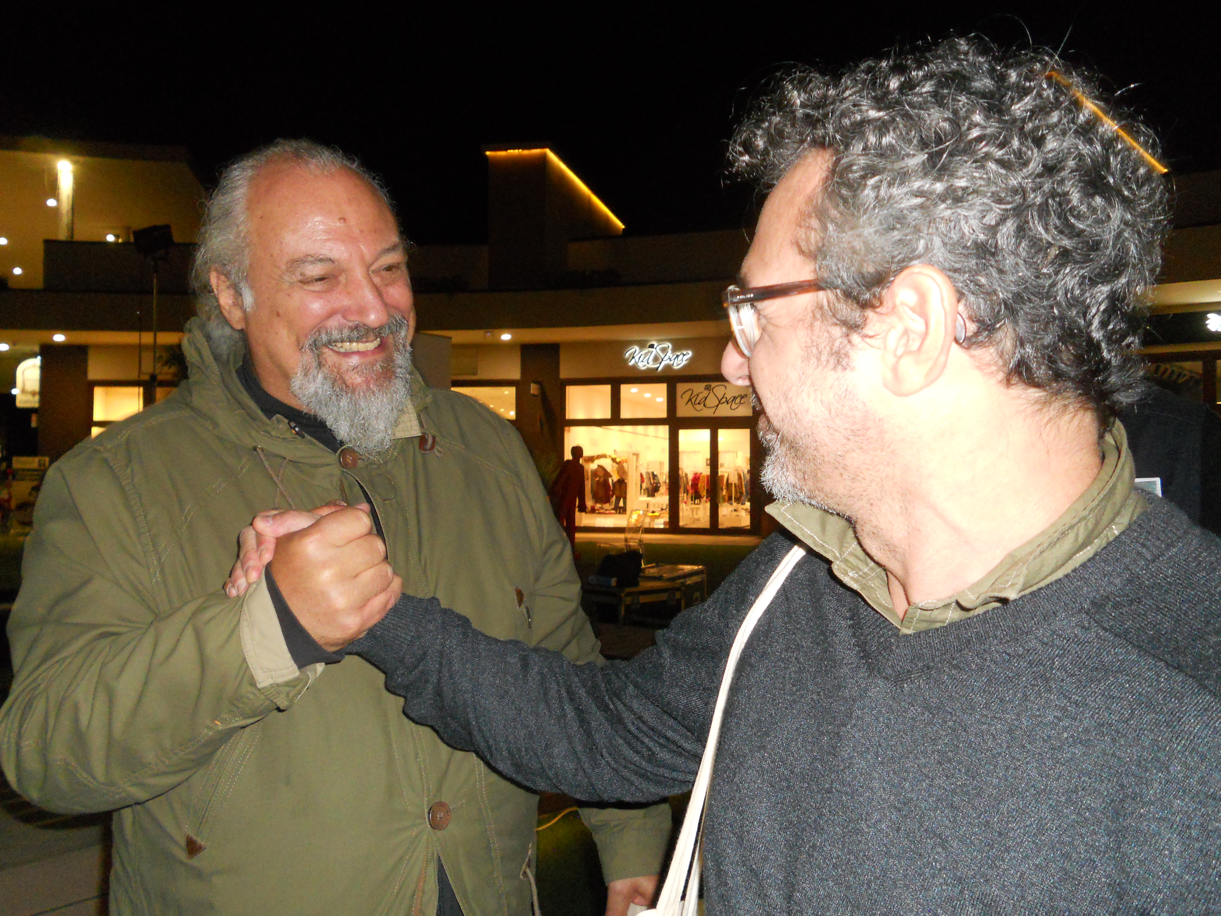 Marco Sommariva con Eugenio Finardi